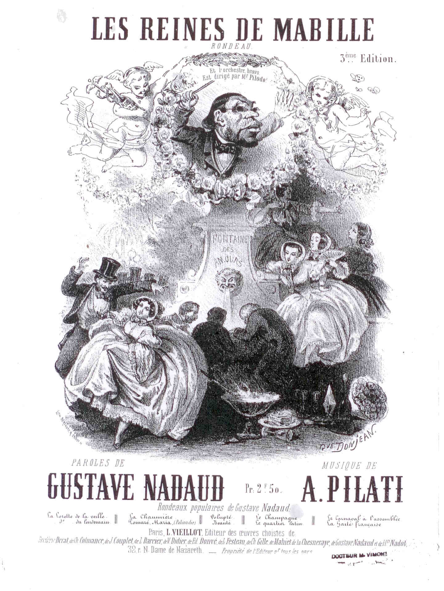 Partition